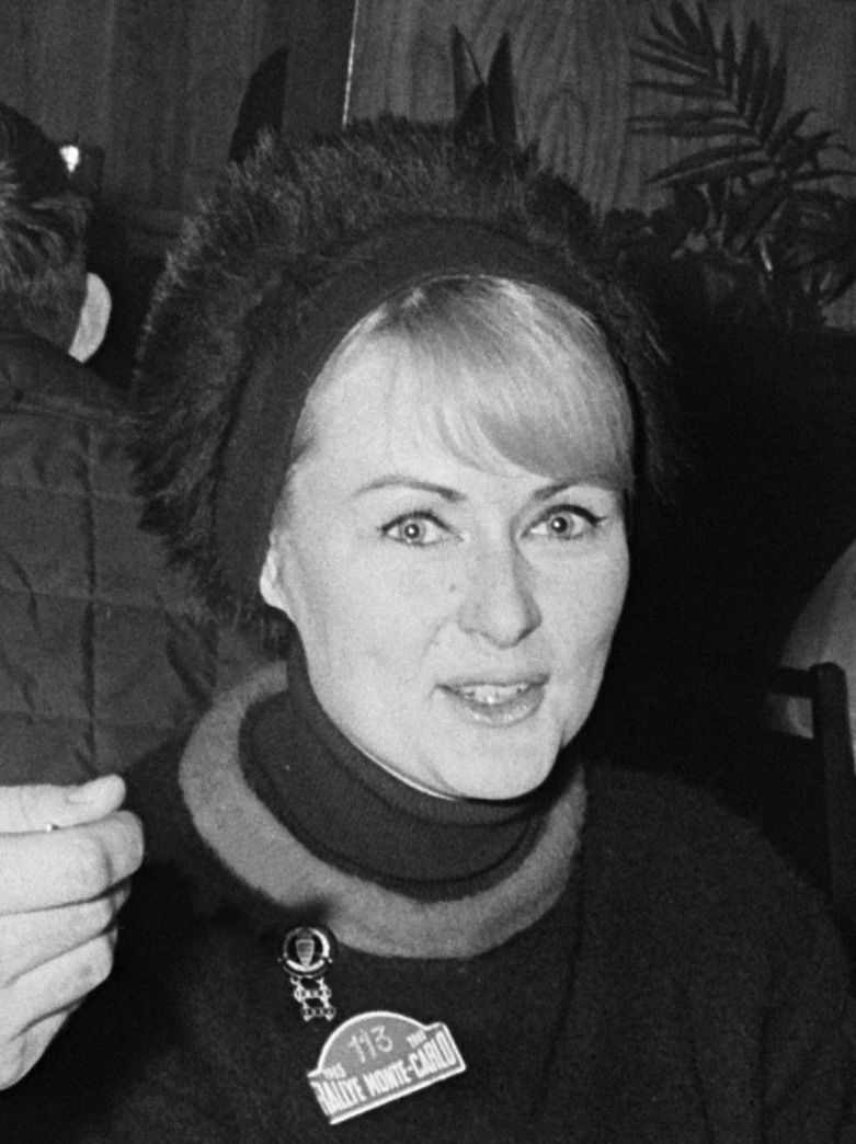 Rally de Monte Carlo , tijdens diner, Miss Rosemary Smith